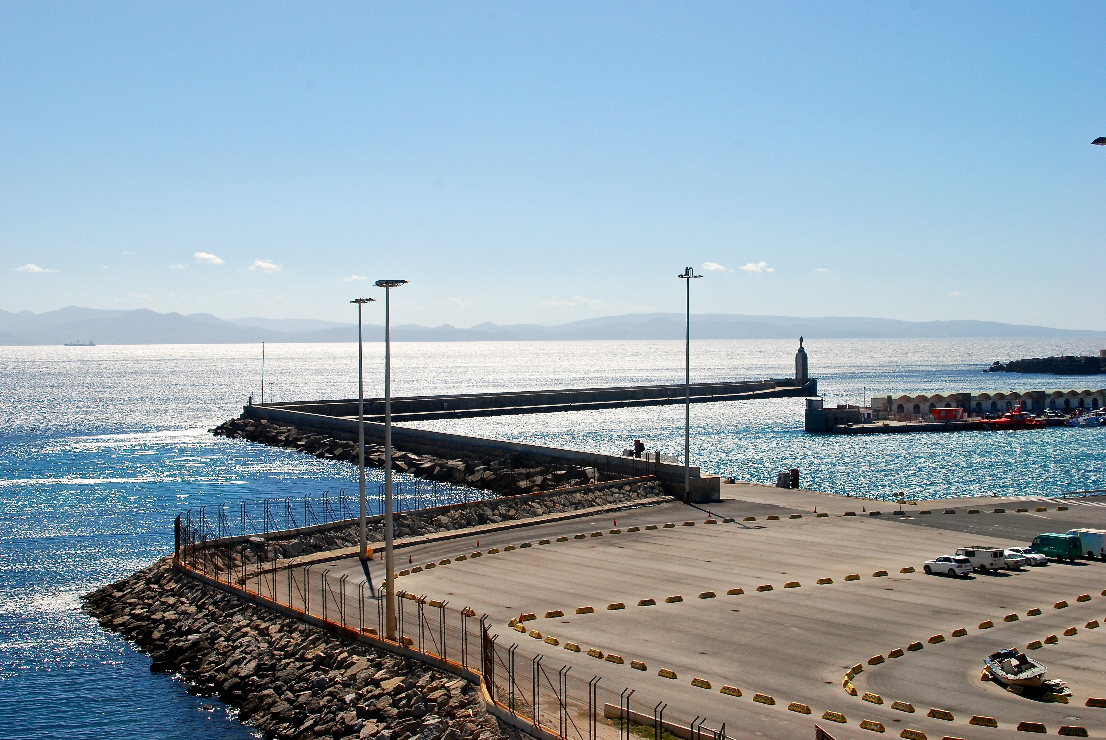 tarifa, spain.